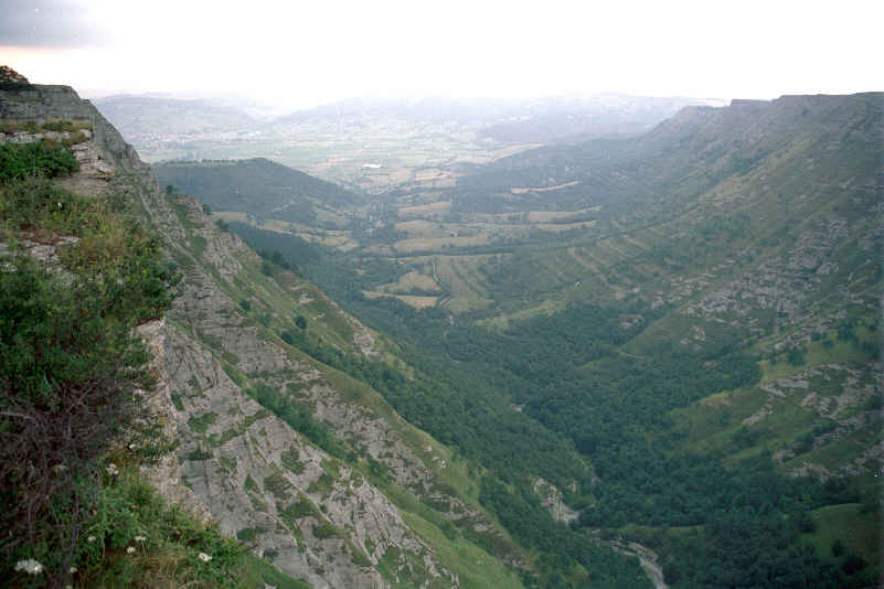 Valle de Délica en Álava (España), visto desde el Salto del Nervión. Tomada por JMSE el 4 de julio de 2003 y cedida a Wikipedia.